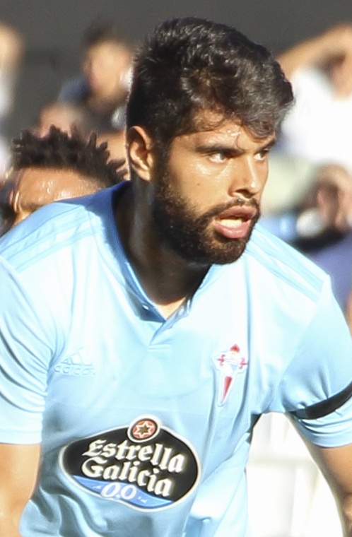 Presentación RC Celta - Temporada 18/19